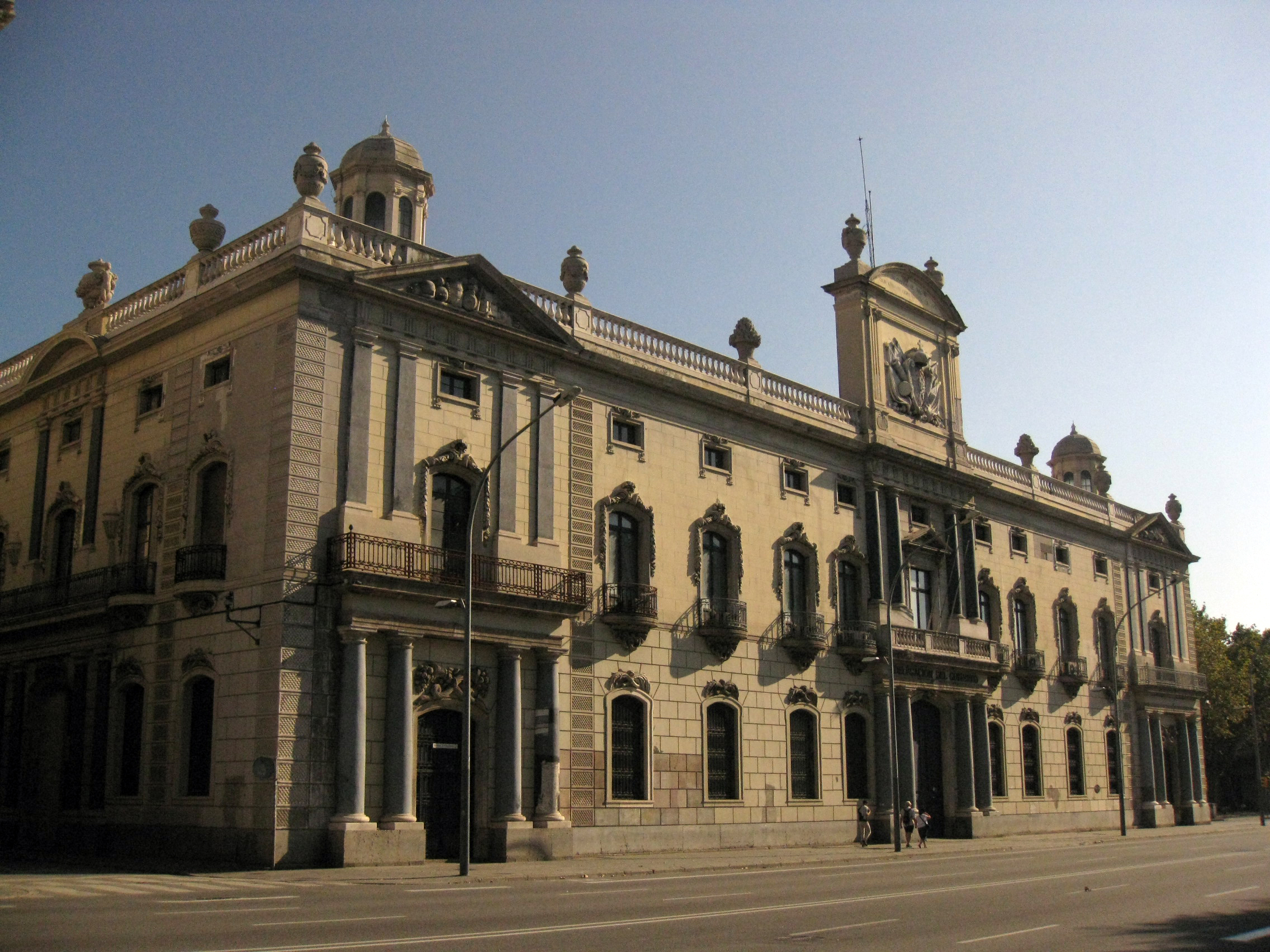 Subdelegació del Govern (Barcelona), antic edifici de la Duana, construït pel comte de Roncali entre el 1790 i el 1792. Vista de la façana de l'avinguda del Marquès de l'Argentera.